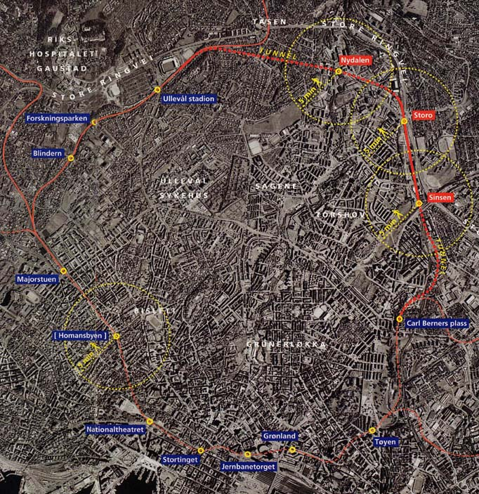 Kart over t-baneringen i Oslo. Fra samferdselsetaten i Oslo. / map over t-baneringen in Oslo. taken from the community section in Oslo